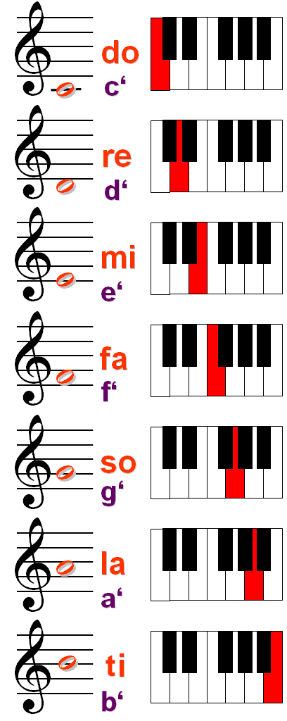 Nederlandse vertaling van do re mi